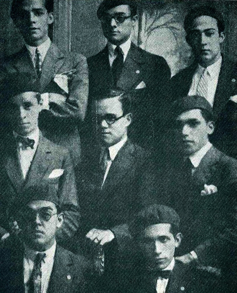 Estudiantes de la Generación del 28, Primero de la parte superior Derecha Germán Suárez Flamerich, segundo Rómulo Betancourt, primero de la izquierda (segunda fila) Jóvito Villalba, 1928.